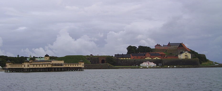 Varbergs fästning och Varbergs kallbadhus.